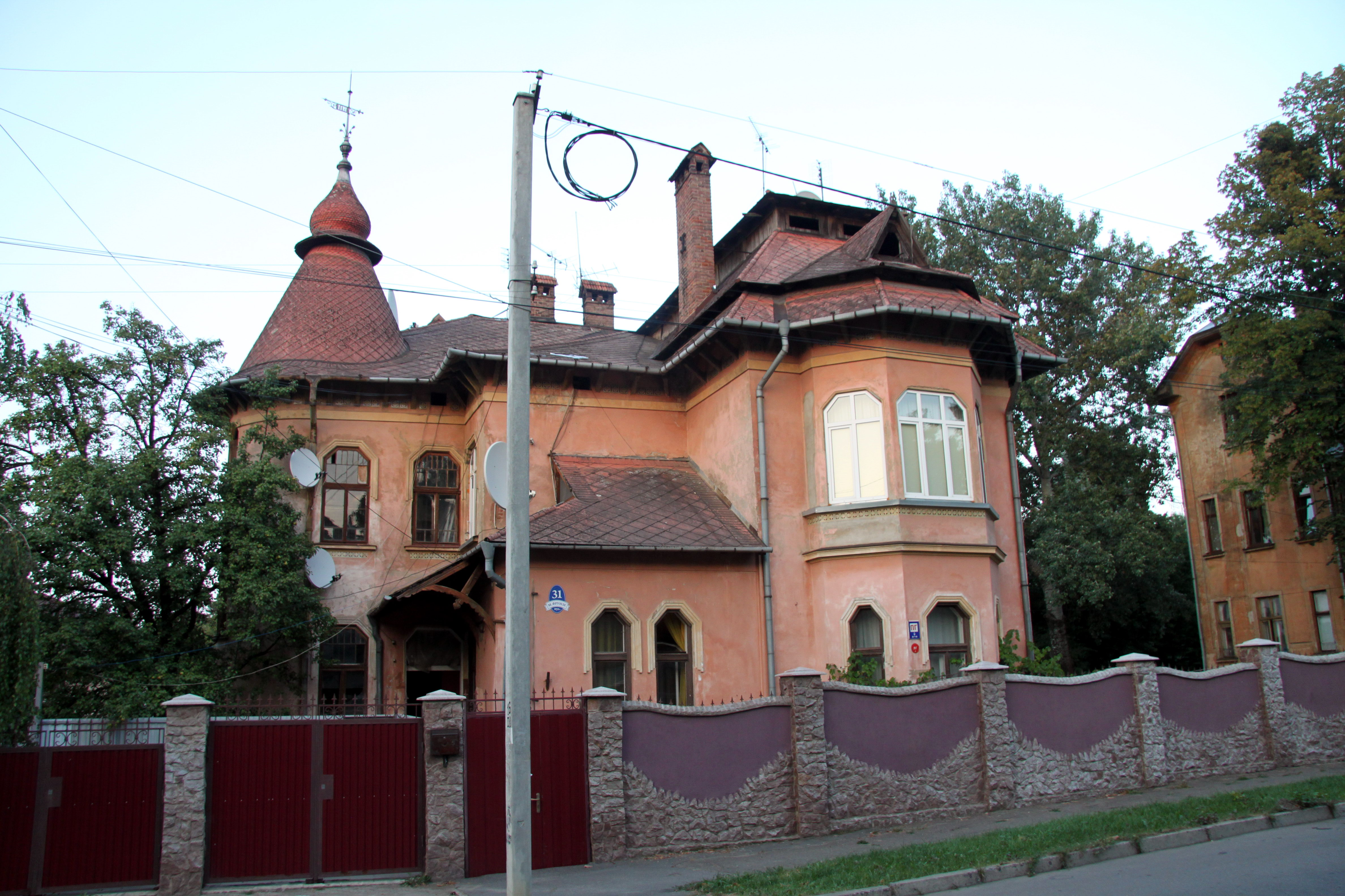 Вілла, Фрунзе Михайла, 31 – Ботанічний провулок, 1, Чернівці